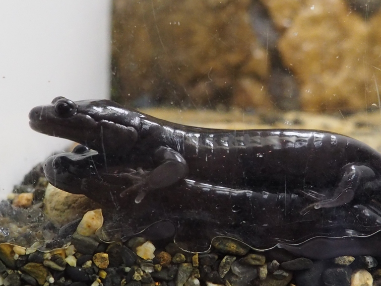 京都水族館